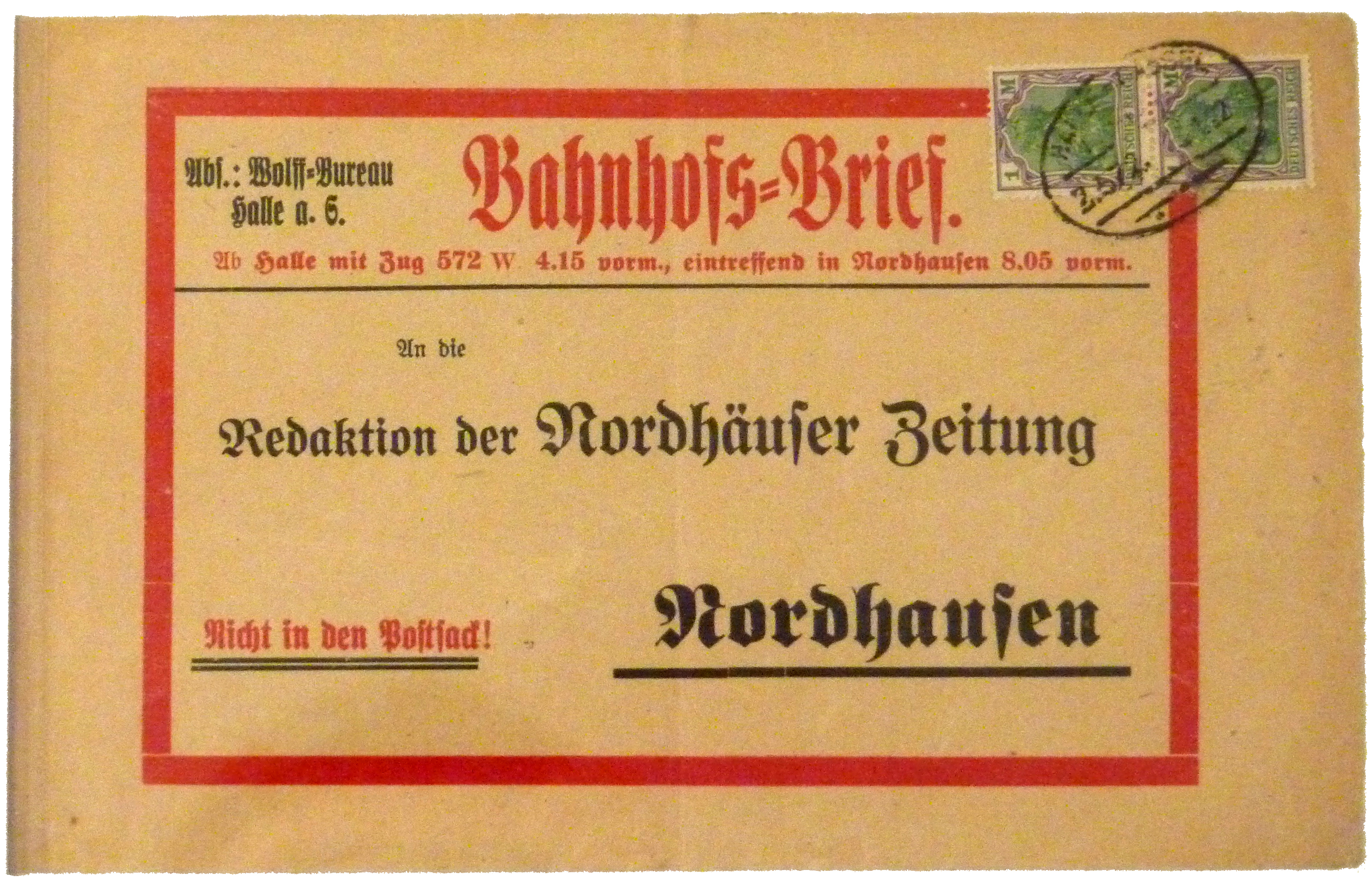 Bahnhofsbrief